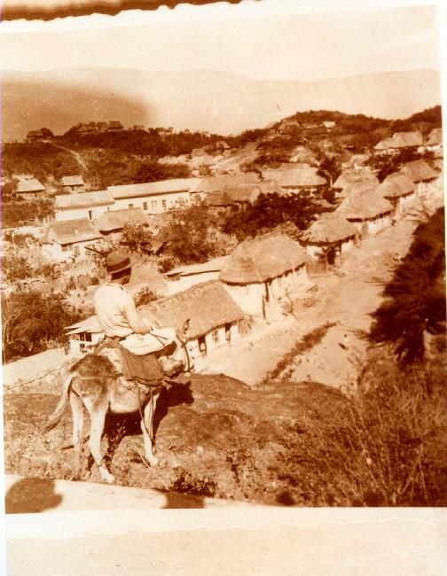 Foto del caserío de Quinchíaviejo.